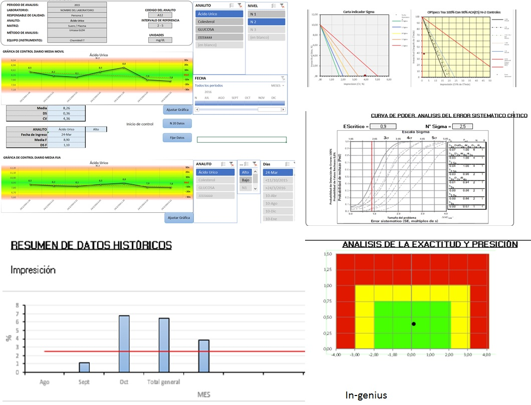 Ejemplo de las herramientas utilizadas para el control estadístico de la calidad en un laboratorio clínico